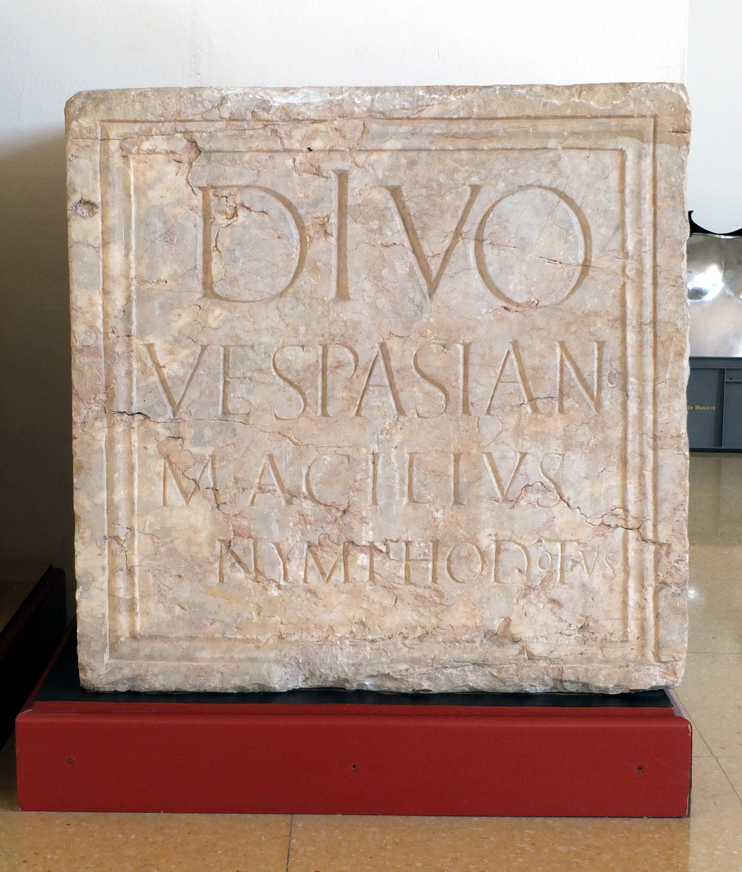 Voetstuk van een standbeeld van keizer Vespasianus Eerste eeuw n.C. Museu Nacional Arqueològic de Tarragona MNAT P-21